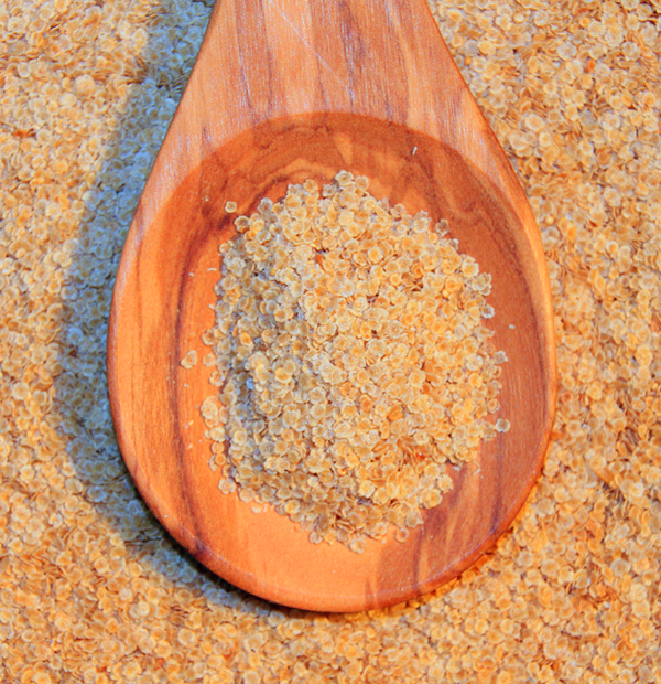 Amaranth-flocken